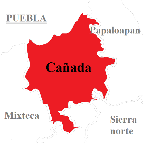 Región Cañada, una de las ocho regiones que conforman al estado mexicano de Oaxaca.